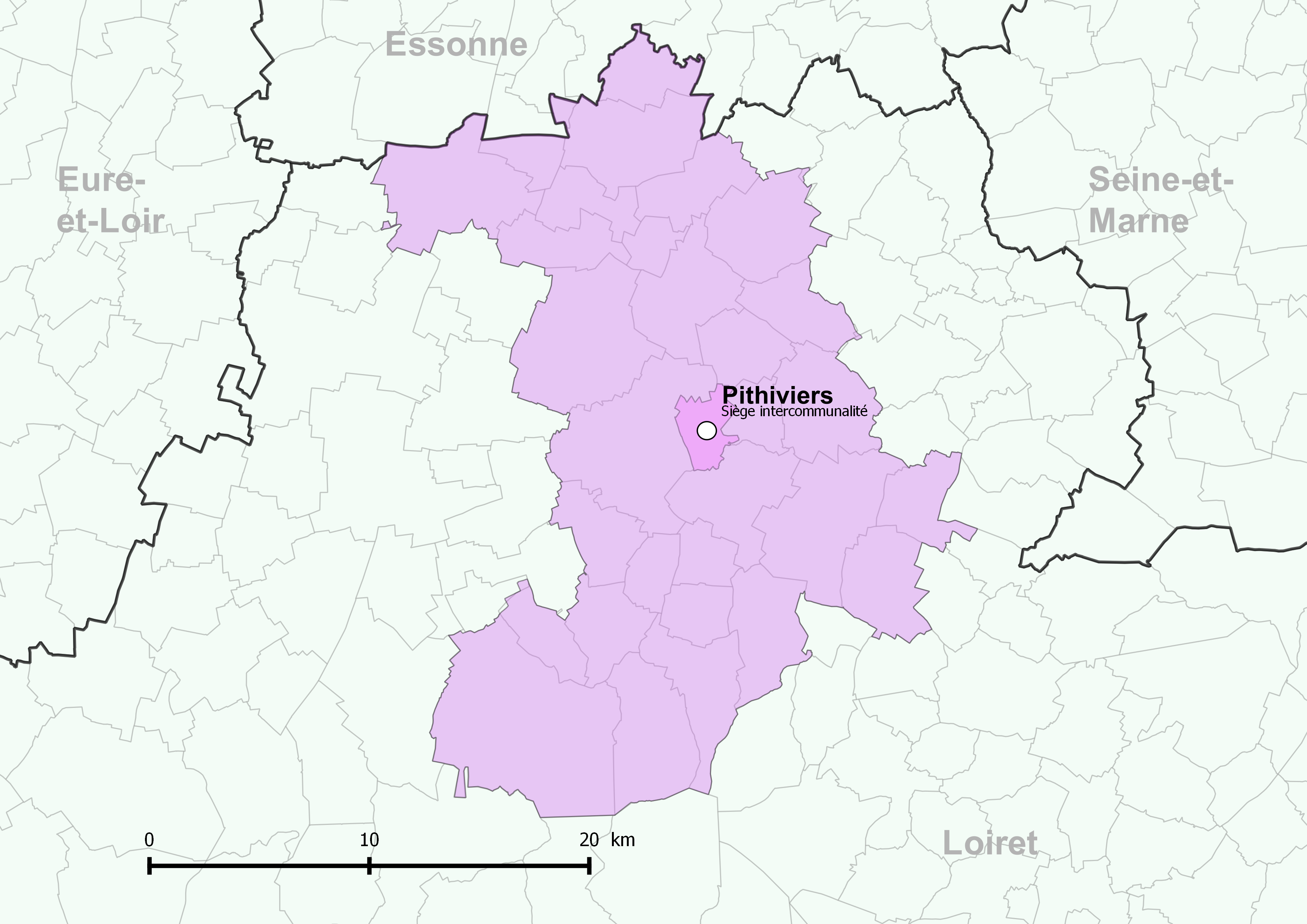 Périmètre de la communauté de communes du Pithiverais - Positionnement de la commune de Pithiviers.